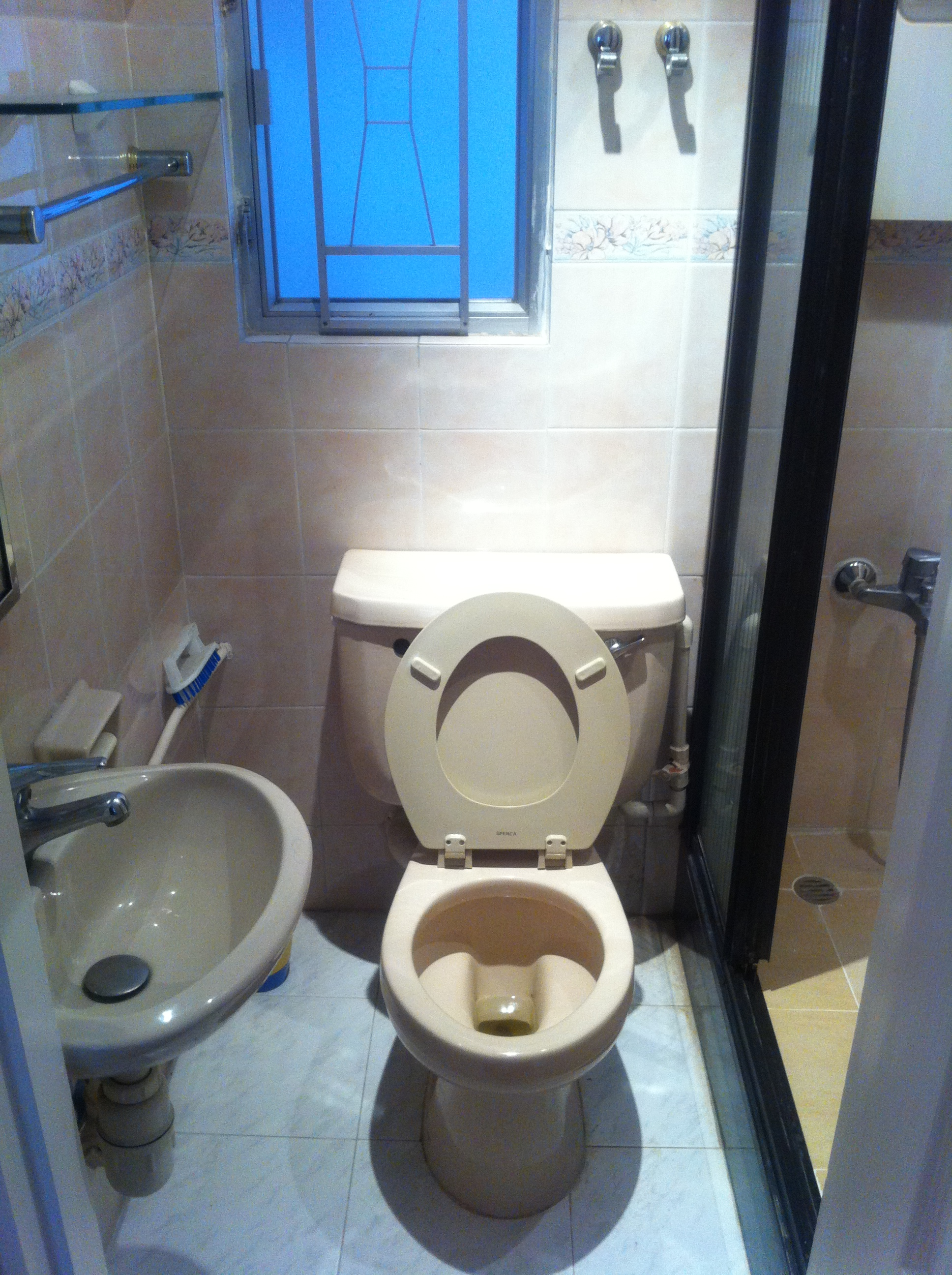 2011年1月香港住宅富來閣，石英燈燈光效果